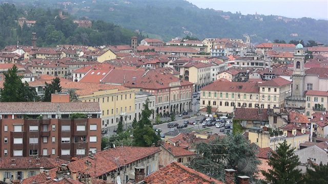 Panorama del centro di Biella (piazza Martiri della Libertà; al centro della foto: il teatro Sociale) visto dalle alture del Piazzo